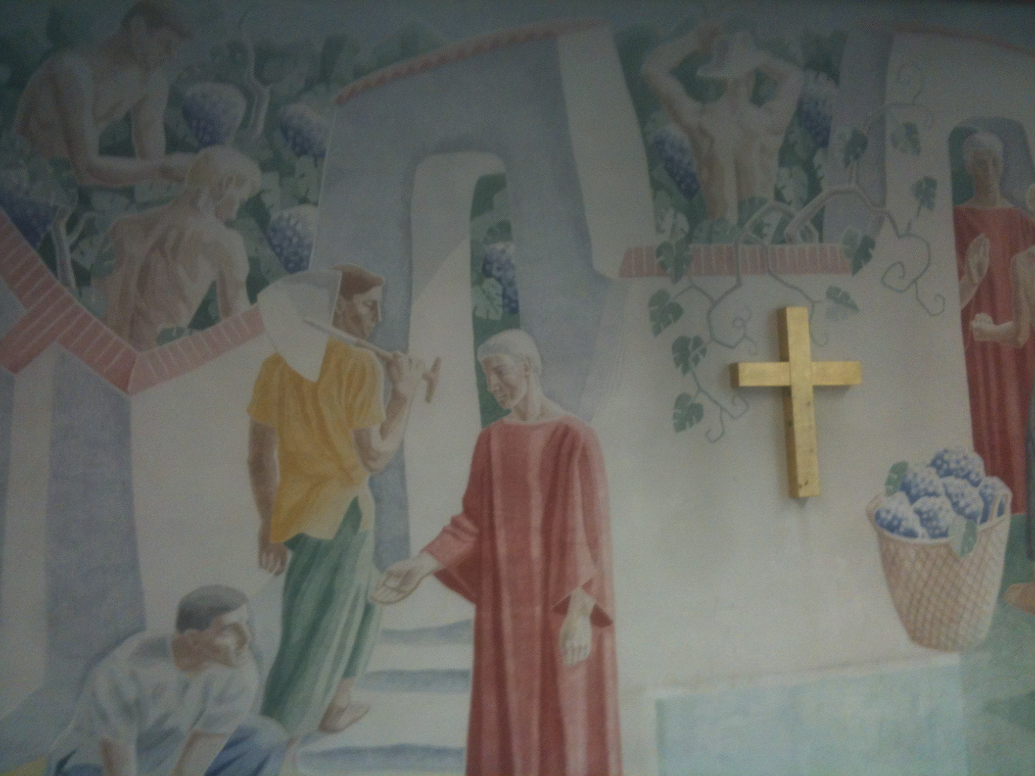 Arbejderne i vingården, alterbillede på Bredsted Danske Skole, Sydslesvig